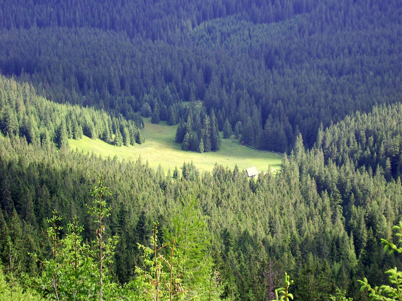 Polana Olczysko ze Skupniów Upłazu